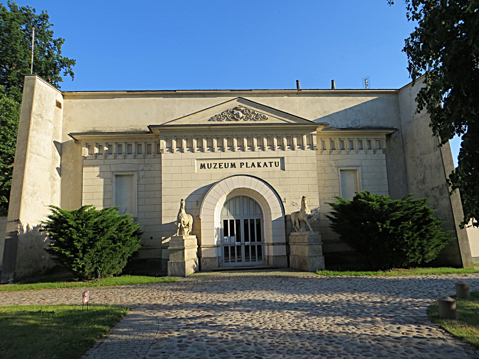 Muzeum Plakatu w Wilanowie - Oddział Muzeum Narodowego